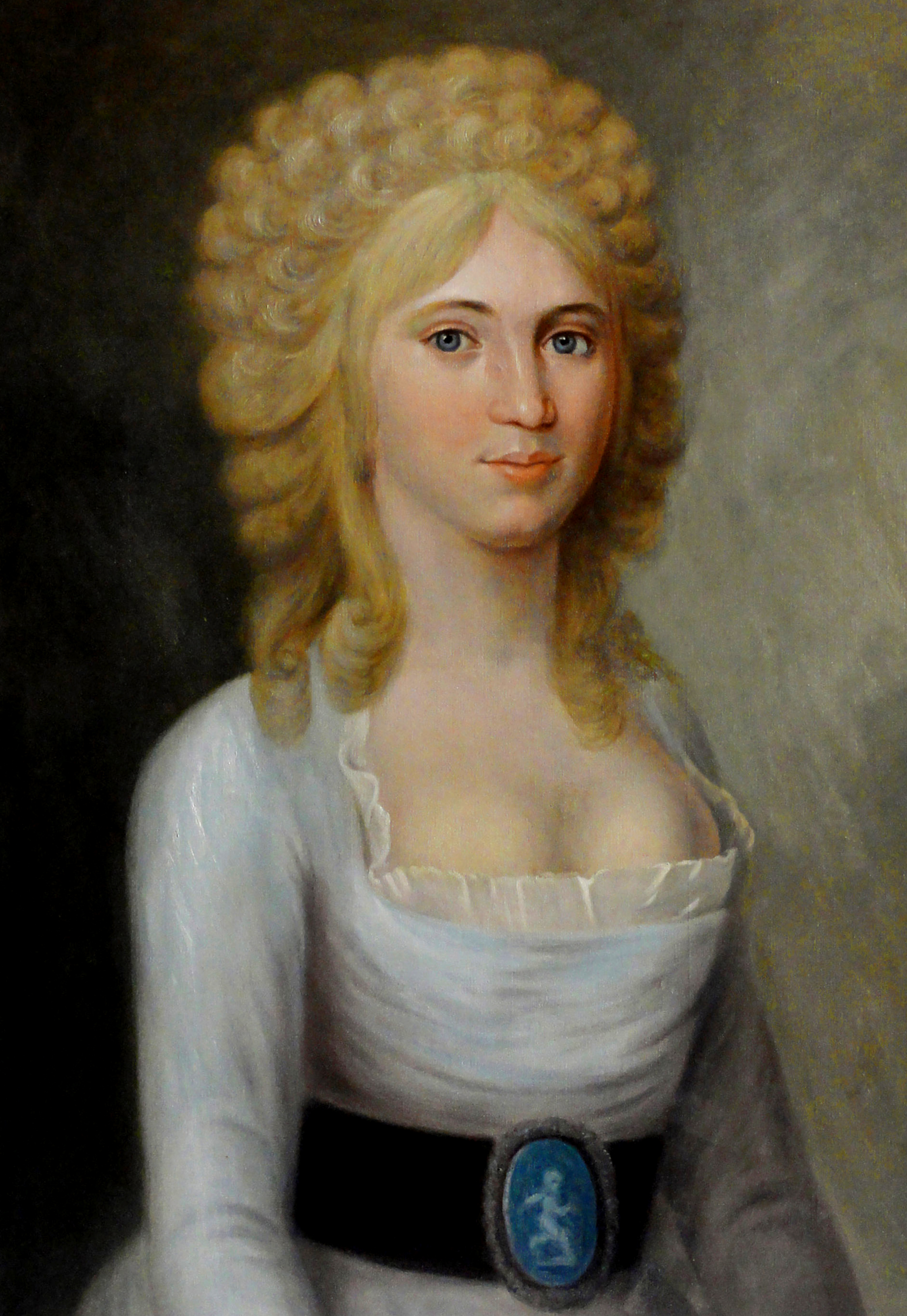 Katharina Rothan verheiratete Traitteur 1774 -1844. Gemälde aus dem Familienbesitz, Jahr und Maler unbekannt